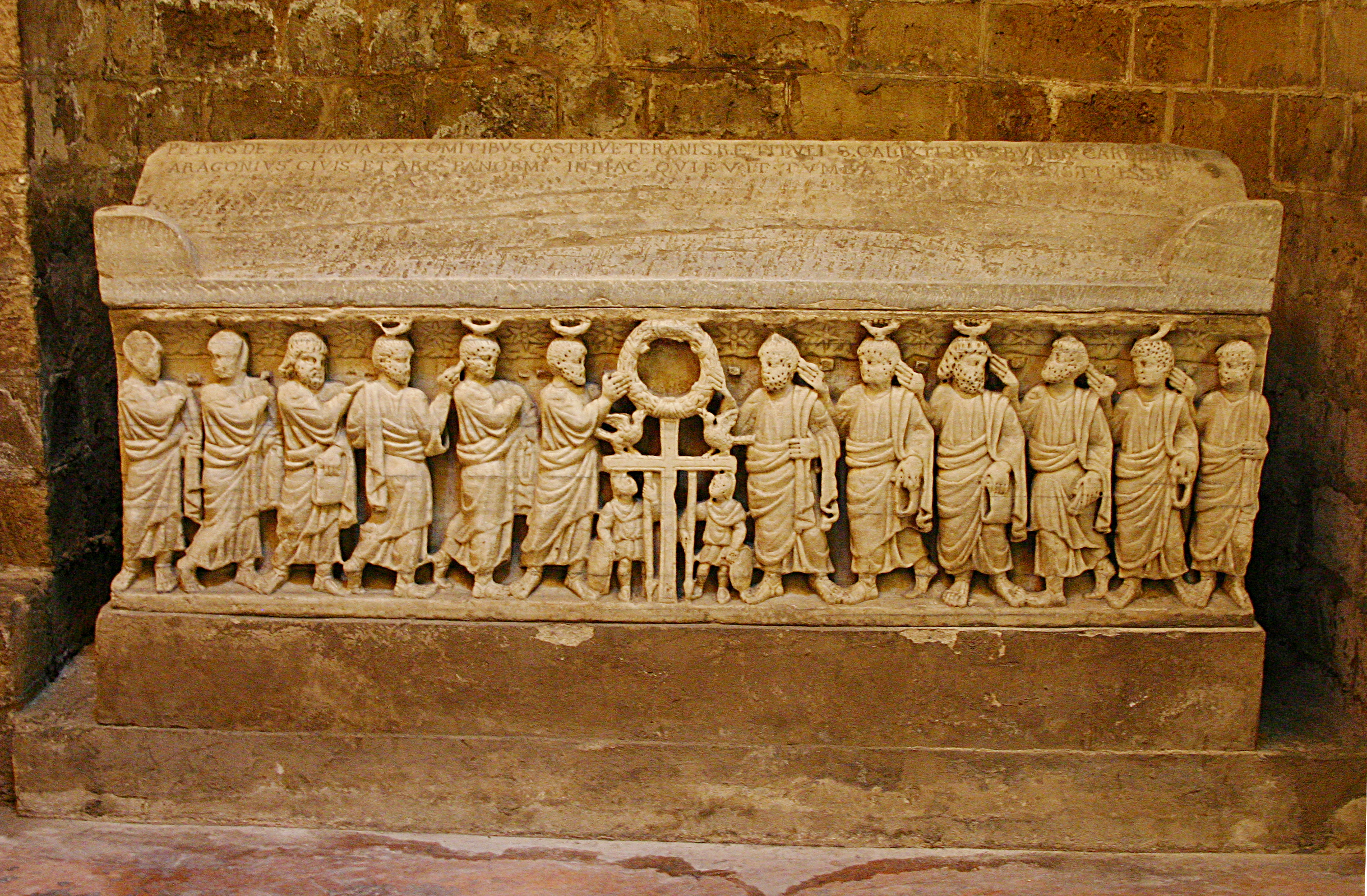 Crypt - Cathedral of Palermo